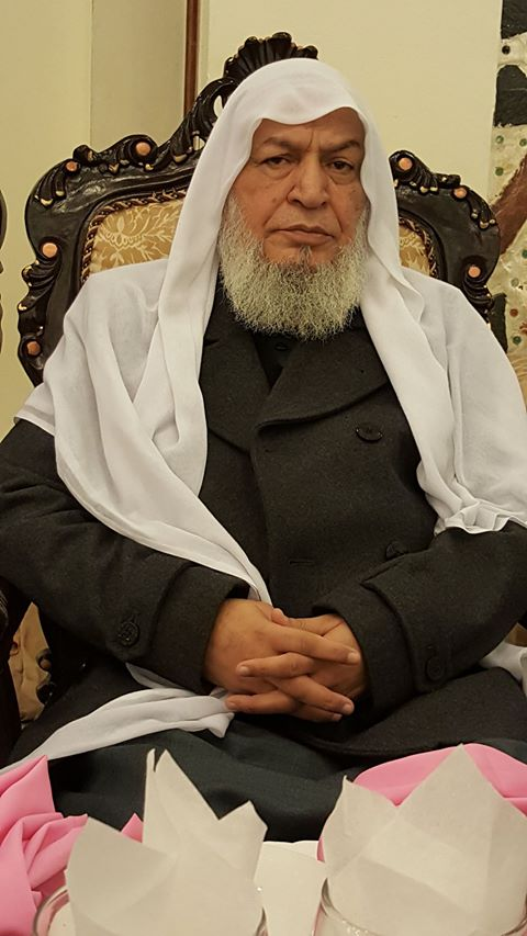 Biography of Sarkar ji